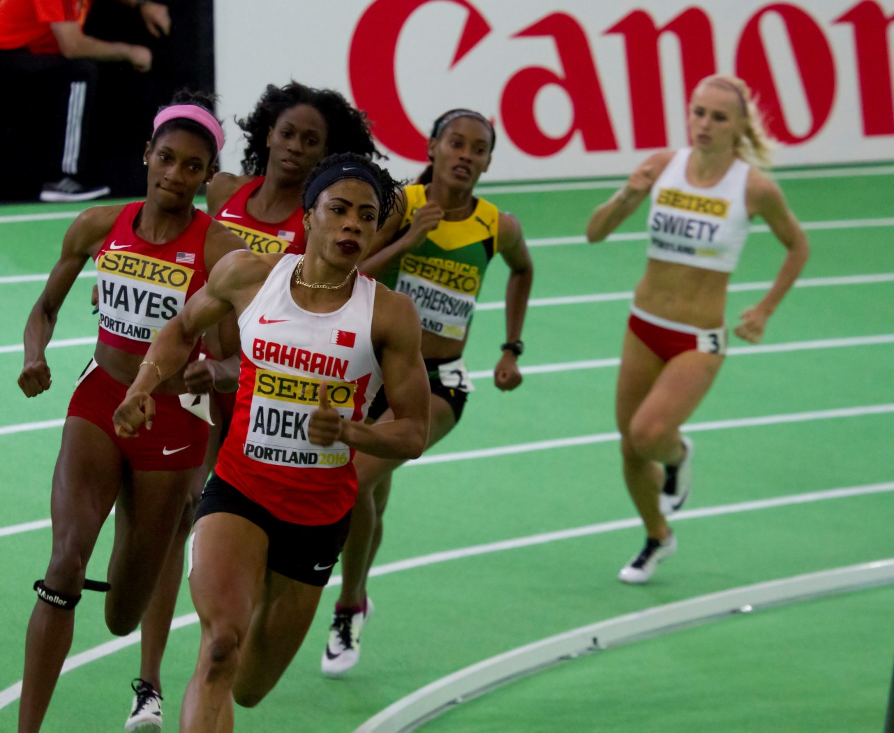 468 finale 400m dames